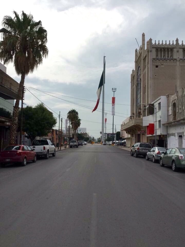 Vista de la Bandera desde la calle lateral.